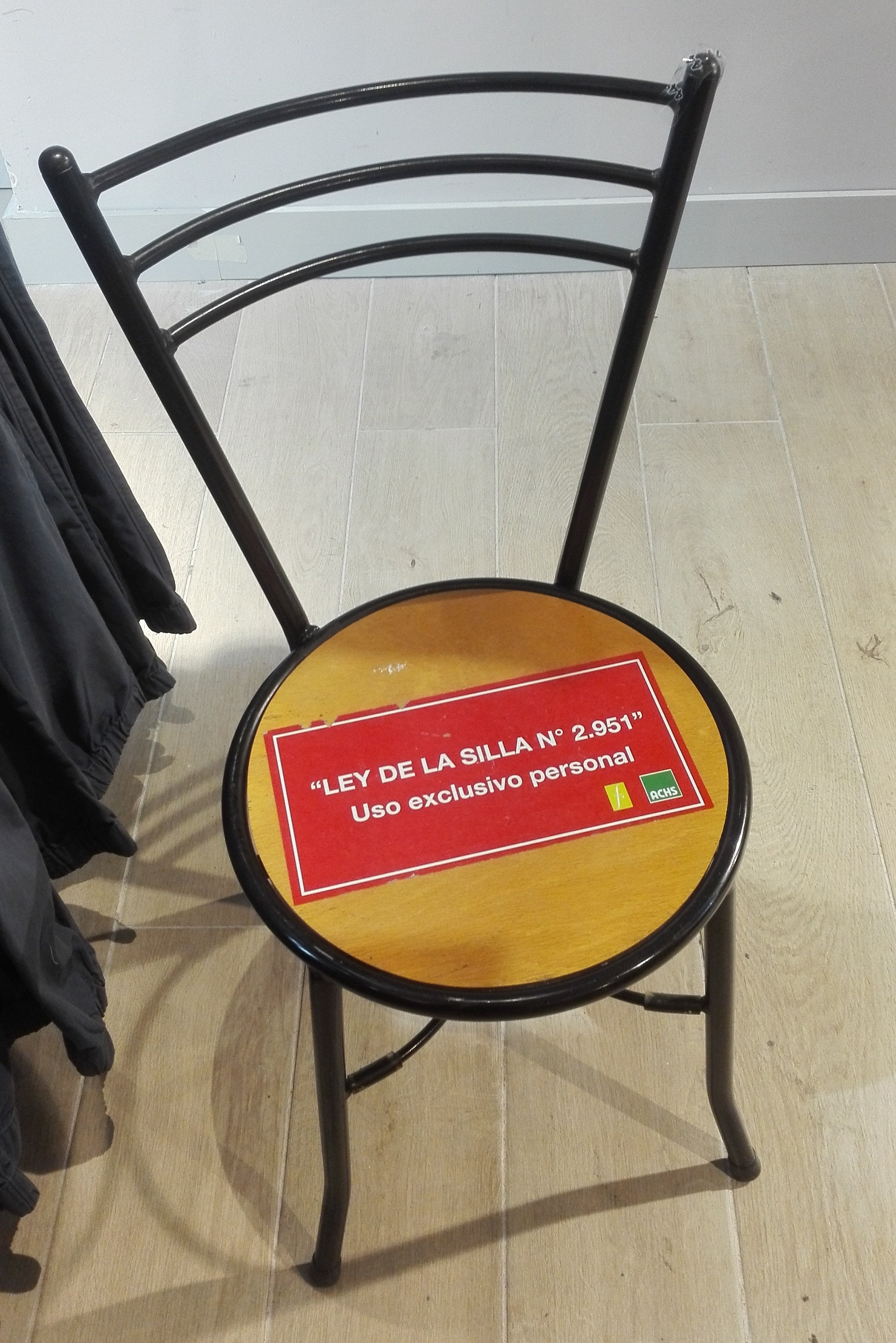 Silla indicando la "Ley de la silla" en una tienda de Santiago de Chile.